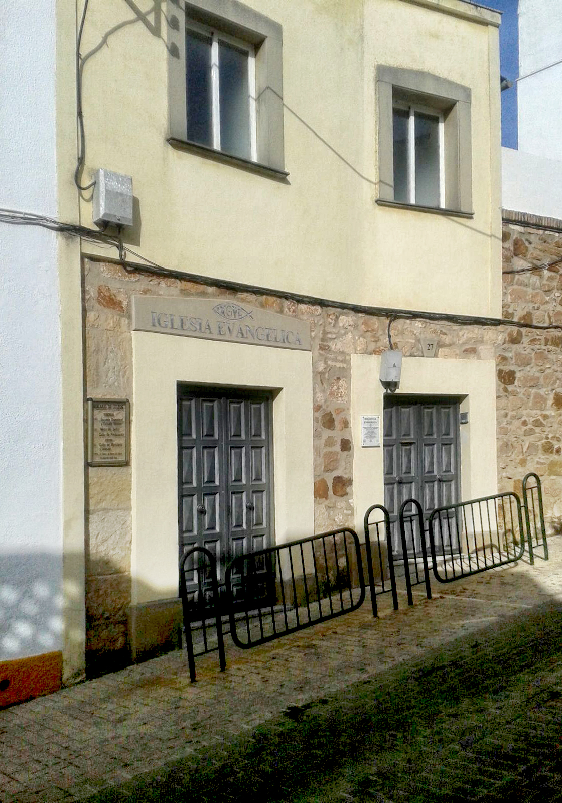 Fotografía de la iglesia evangélica de la calle Cambroneras de Linares (Jaén) que tomé con la cámara de mi móvil la tarde del 25 de mayo de 2016. Posteriormente, la he retocado con Photoshop, eliminando las deformaciones propias de la perspectiva y armonizando más los colores.